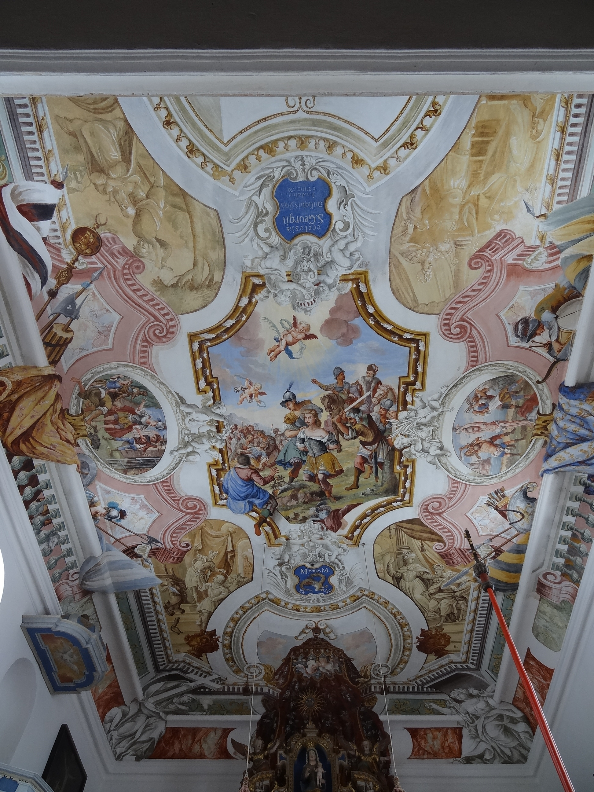 Ramsachkircherl, Decke, Hauptbild: Enthauptung des hl. Georg